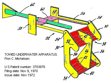 Underwater towed paravane water kite.